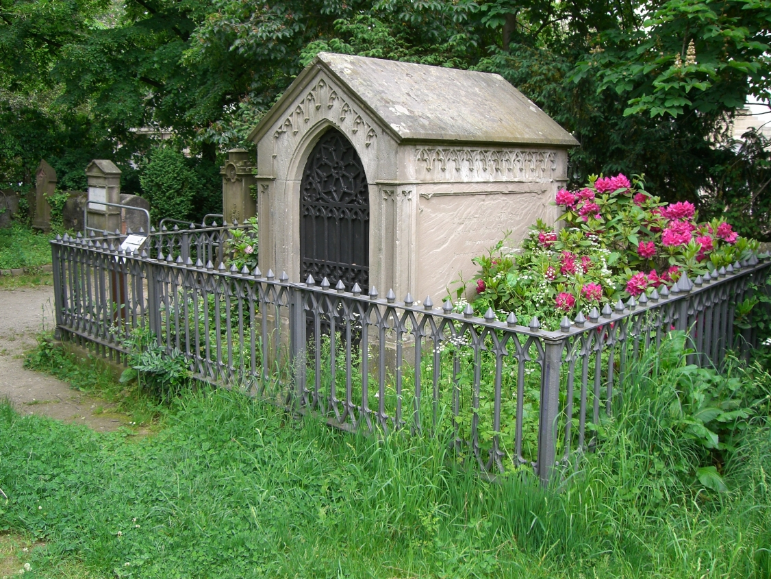 Grabmal der Familie Dortu Freiburg im Breisgau